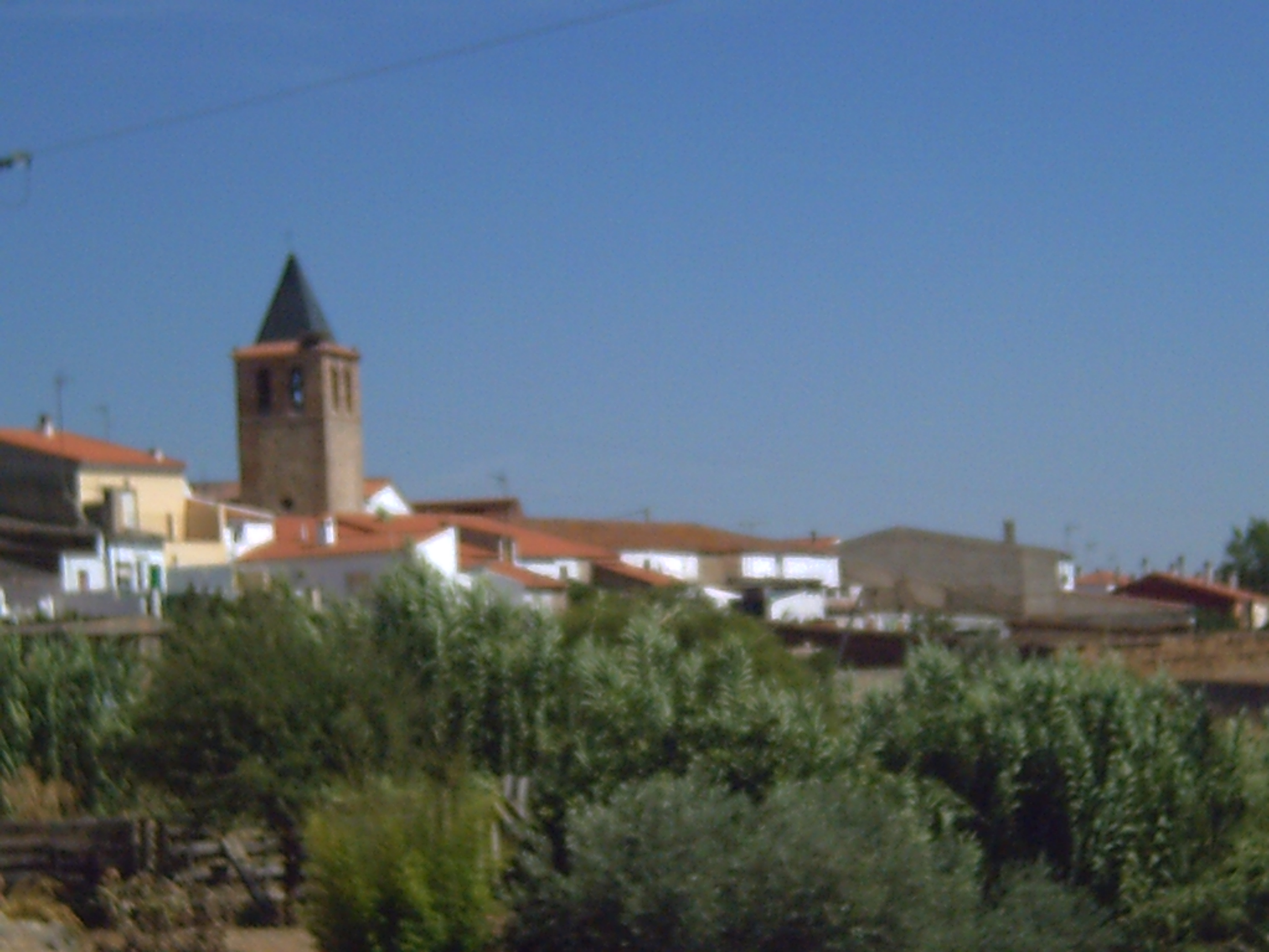 Don Álvaru (Província e Badahó)